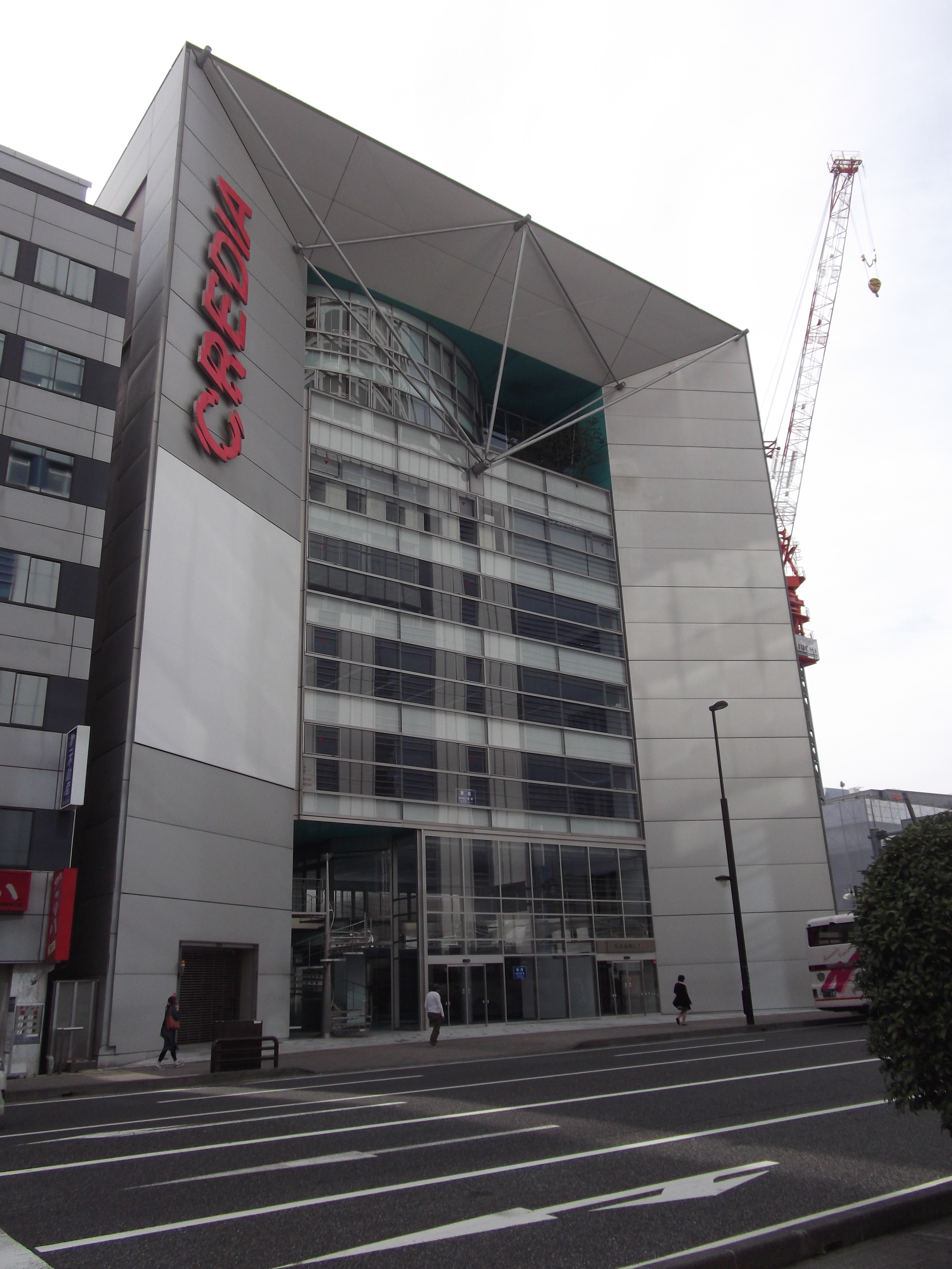 株式会社クレディアの本社ビル